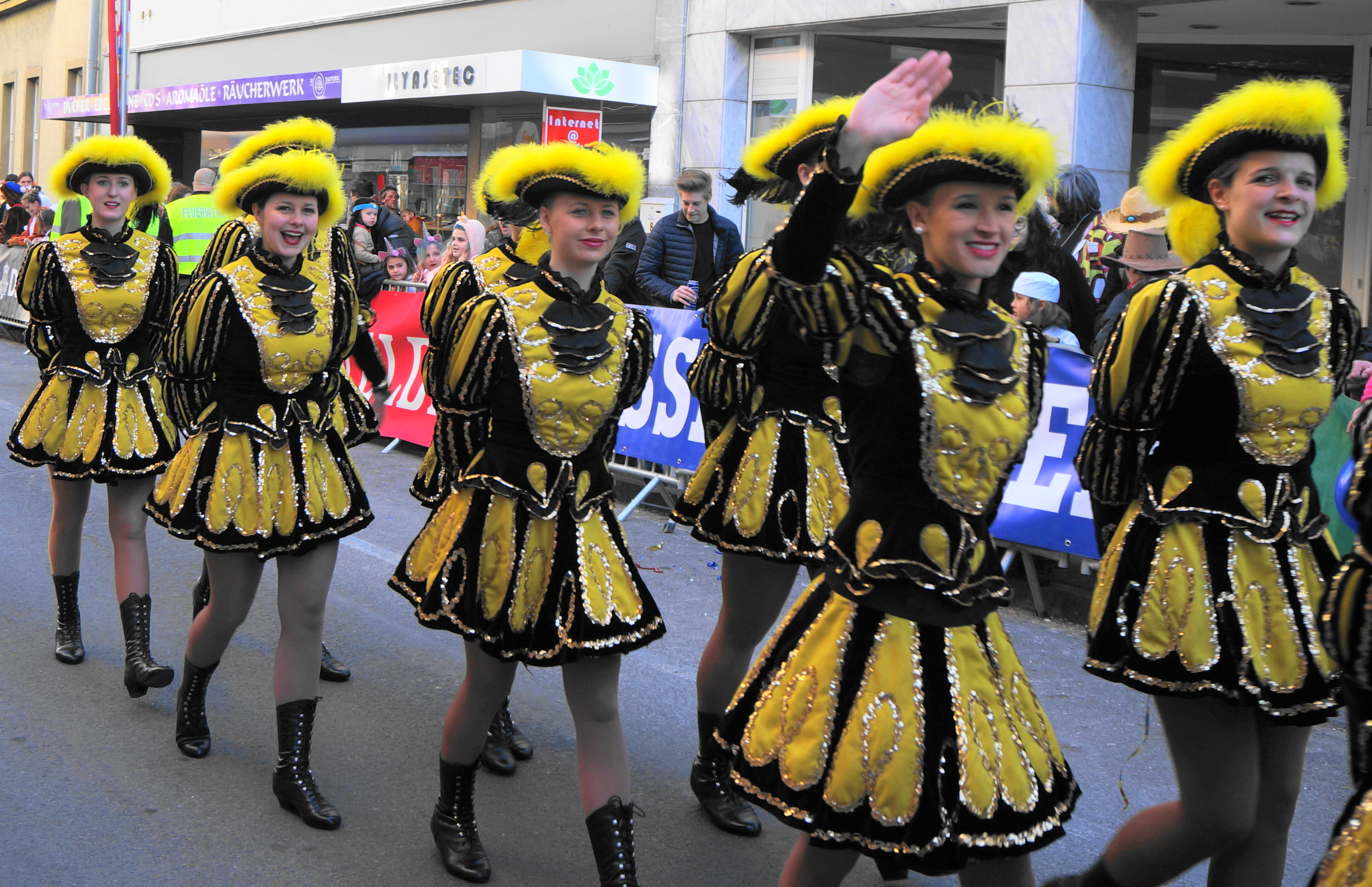 Gilde des Faschings in Villach, Kärnten, Österreich, Europäische Union